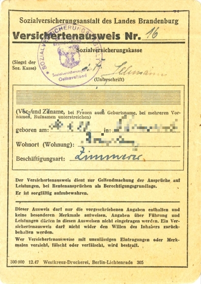 Sozialversicherungsausweis Nr. 16 der Sozialversicherungsanstalt des Landes Brandenburg von 1947. Anonymisiert.